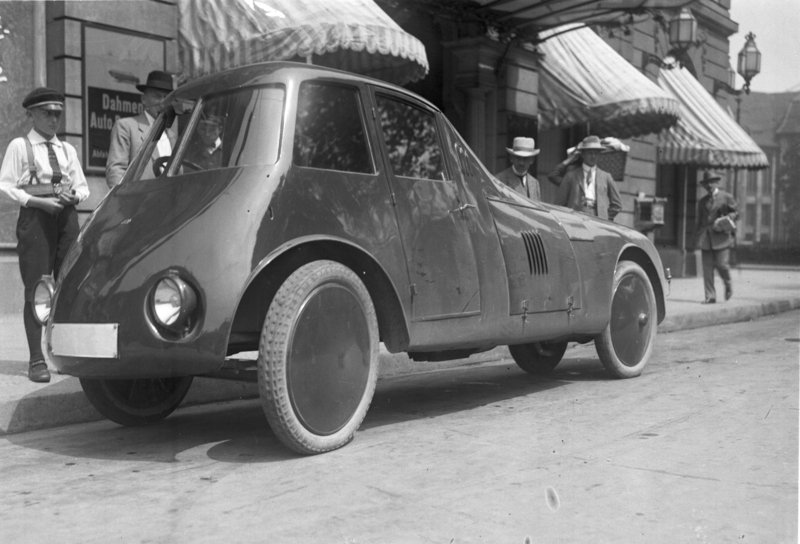 Wird sich diese Autoform durchsetzen? Eine Strom-Linien-Limousine in den Strassen Berlins. Der Motor ist hinten eingebaut. Die Geschwindigkeit beträgt bis zu 150 km. in der Stunde.